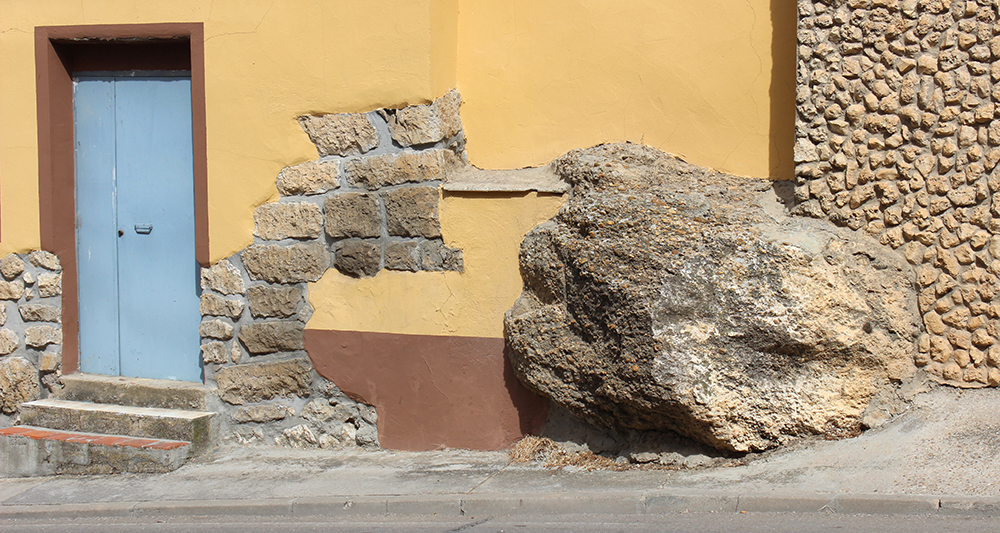 Restos de la Muralla de Cigales en la Avenida de Valladolid